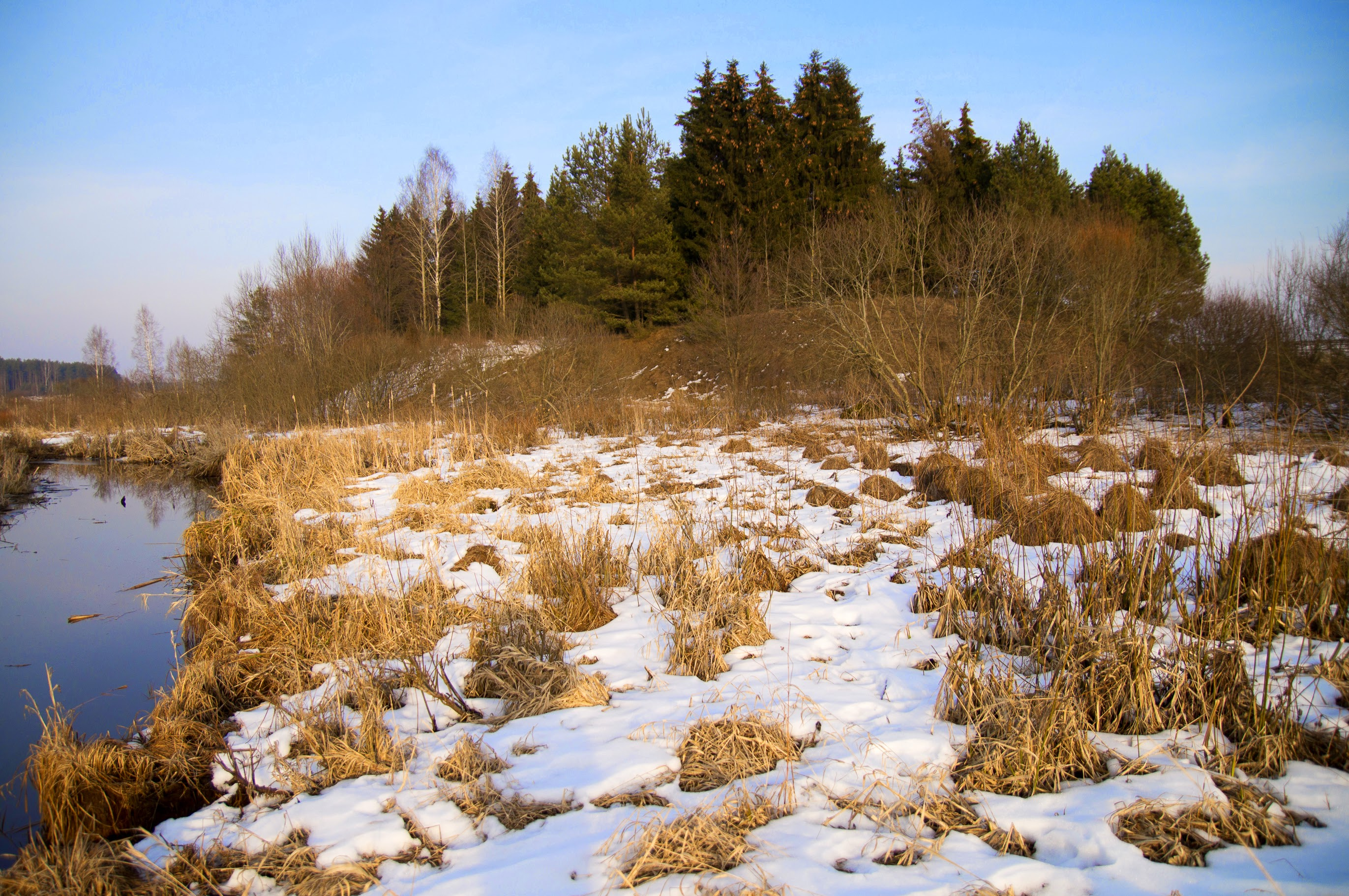 Гарадзішча ля Даўгінава This is a photo of Belarusian heritage monument. Reference number: 612Г000126 ( WLM)